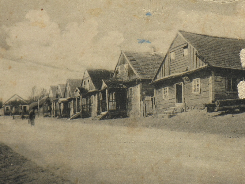 Беларуская (тарашкевіца): Моўчадзь (Moŭčadź), пляц Рынак (plac Rynak)